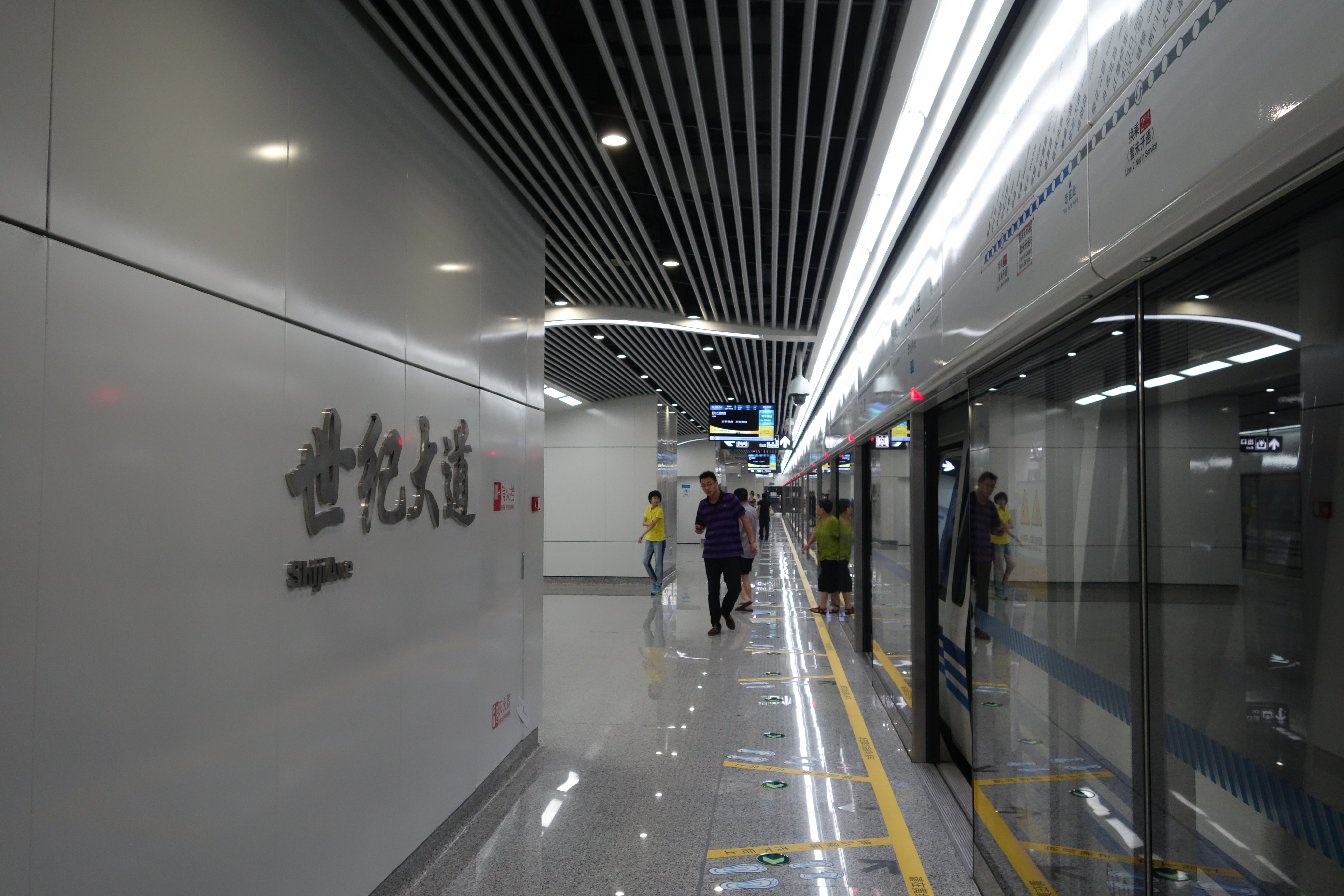 世纪大道站站台